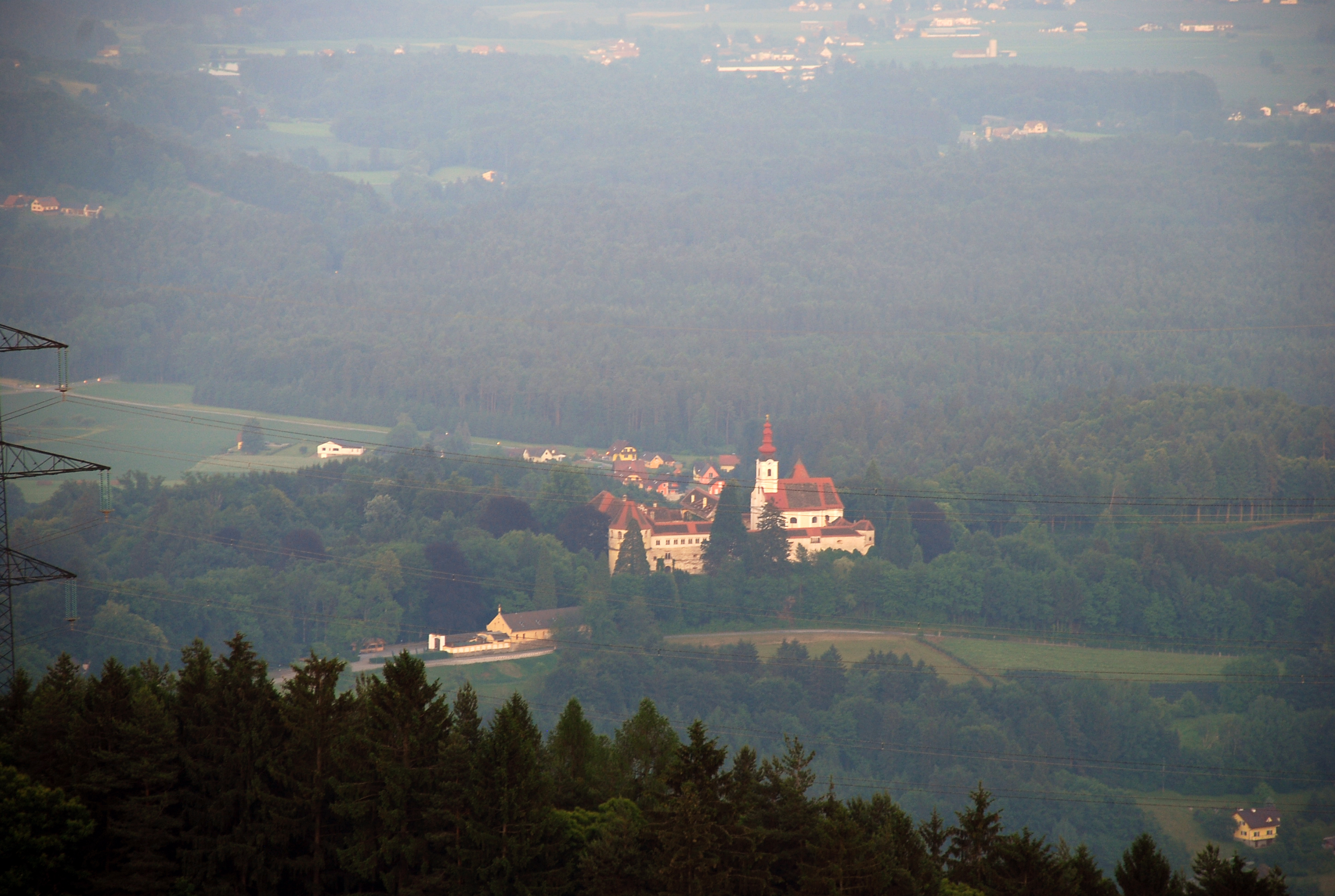 Hollenegg, Steiermark, Österreich: Hollenegg von der St. Wolfgang Kirche aus gesehen